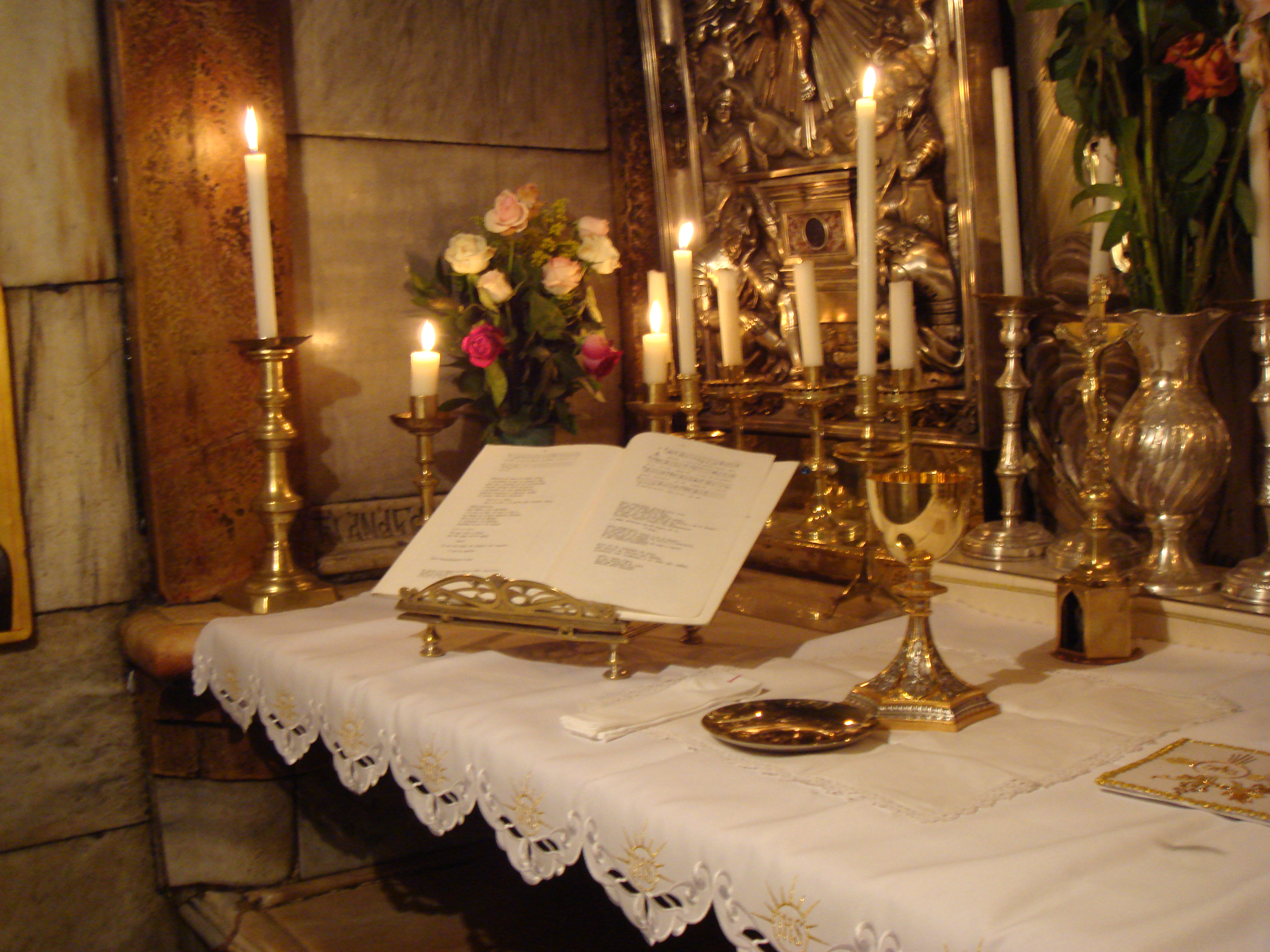 un altar preparado para misa